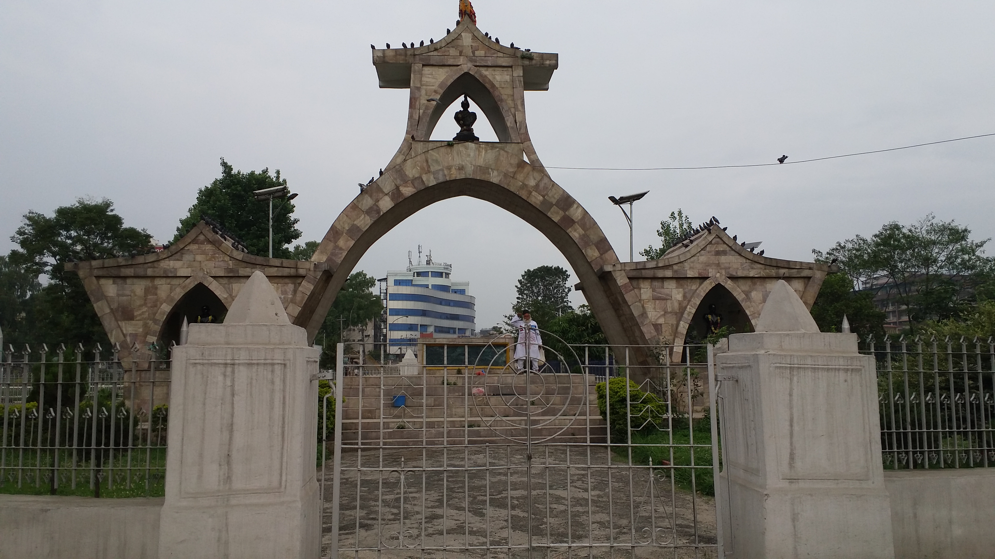 नेपाली: शहिद गेट काठमाडौमा टुडिखेलको दक्षिण तर्फ भद्रकाली मन्दिर र धरहराको बीचमा रहेको शहिद स्मारक हो।